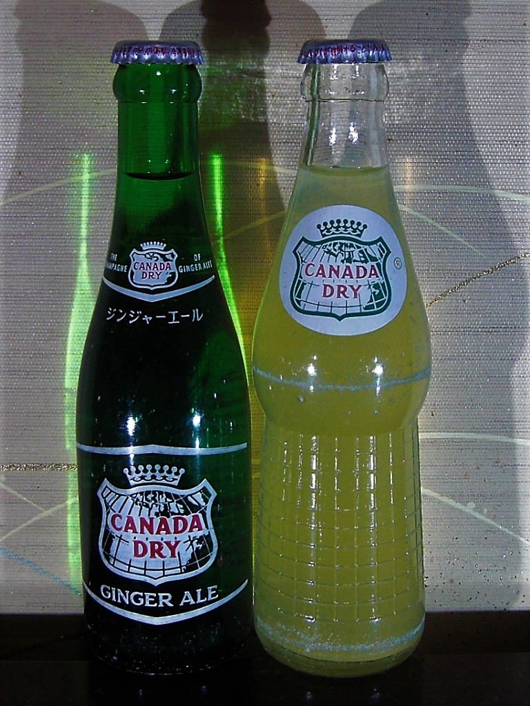 カナダドライ 国際飲料当時のリターナブル瓶入り製品